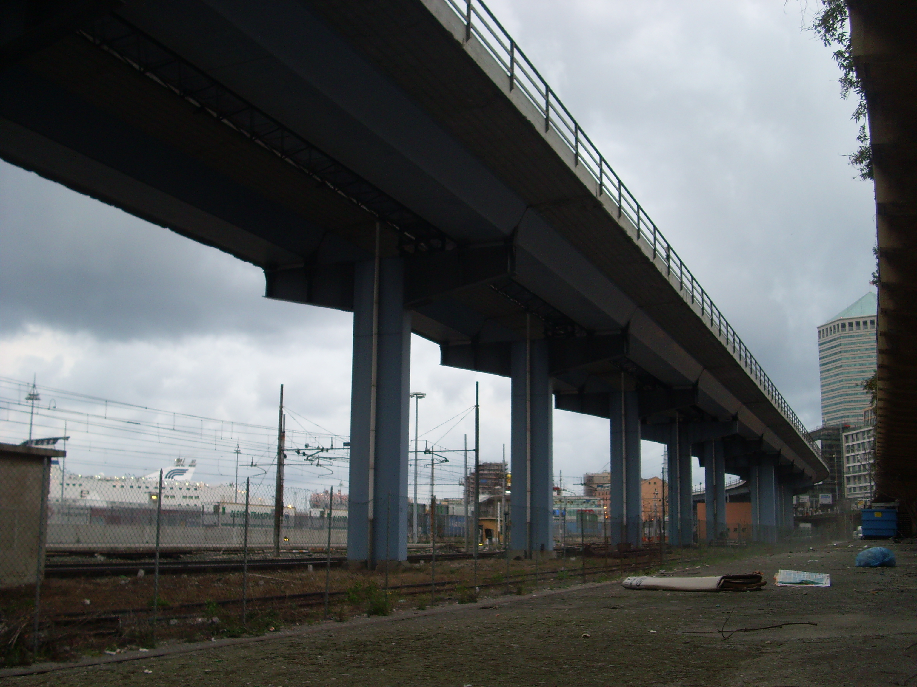 La sopraelevata di Genova vista dalla fermata della metropolitana di via Bruno Buozzi